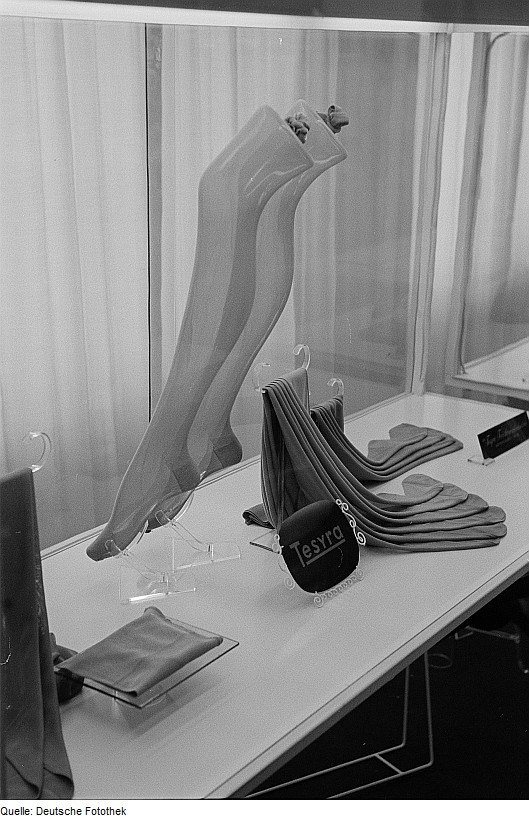 Original image description from the Deutsche Fotothek Strümpfe aus Polyamid-Faser der Tesyra-Feinstrumpf-Industrie Chemnitz auf der Leipziger Herbstmesse 1954